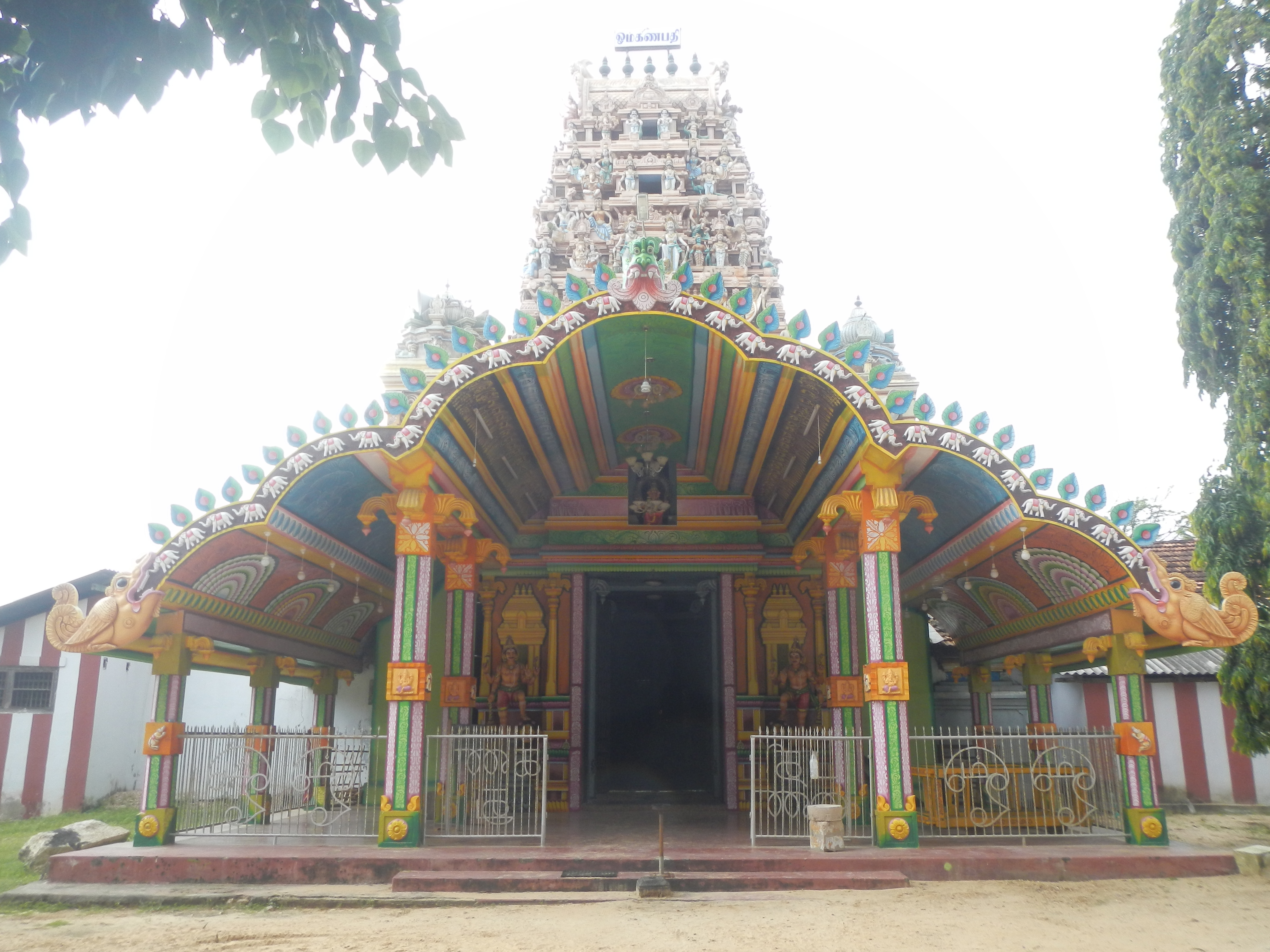 உப்புக்குளம் பிள்ளையார் எனப் பொதுவாக அறியப்படும் சந்திரசேகரப் பிளையார் கோவிலின் முகத்தோற்றம்.